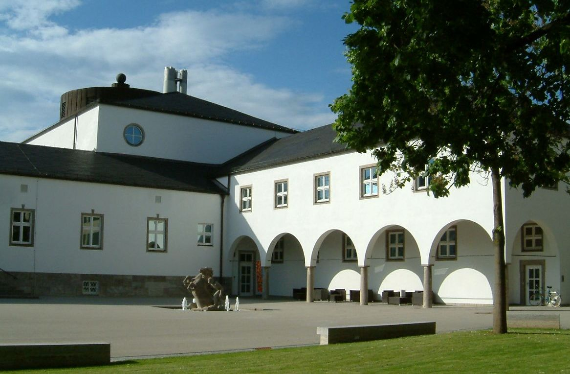 Kunsthalle Schweinfurt, Brunnen und Arkadenbau